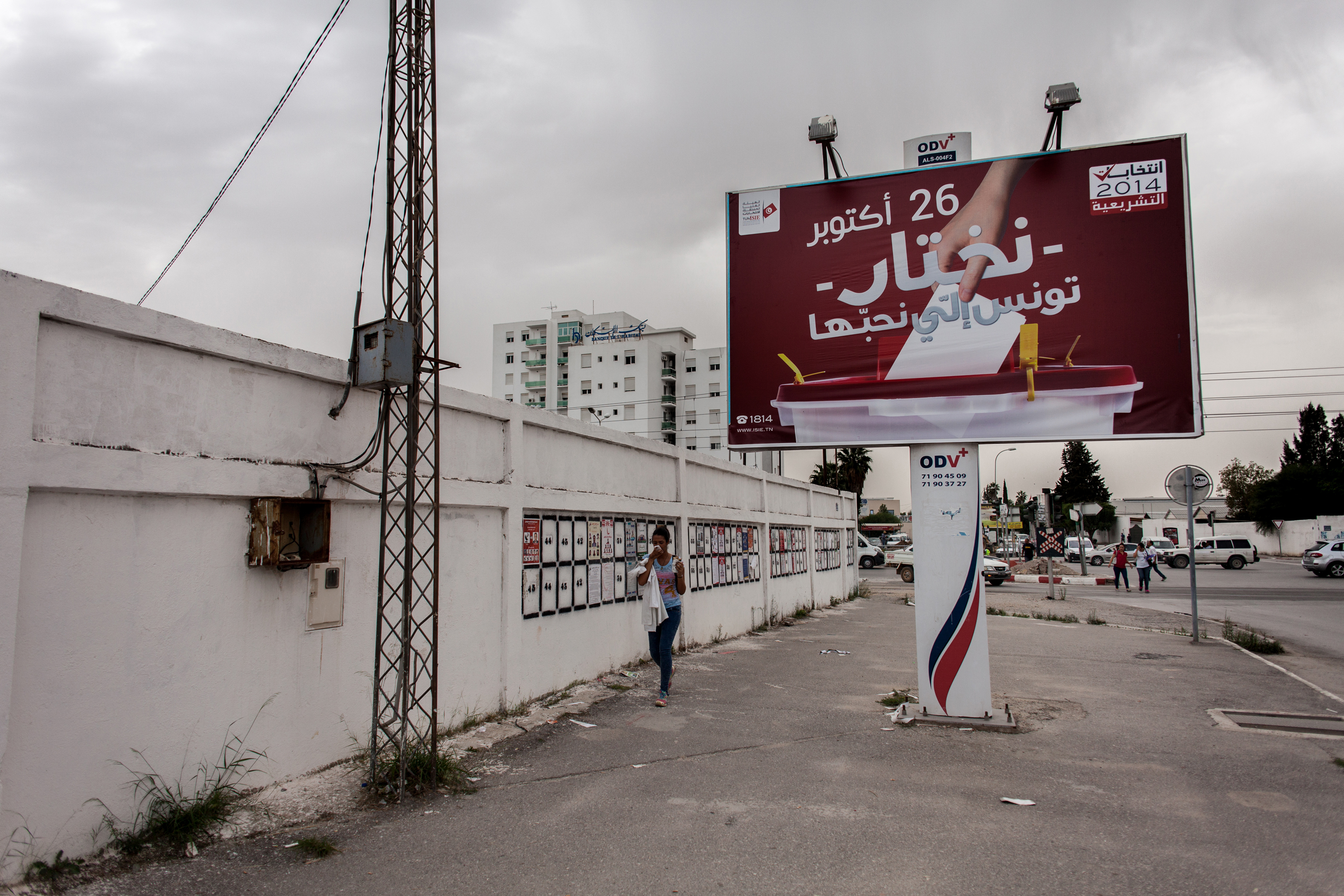 Wahlen in Tunesien 2014